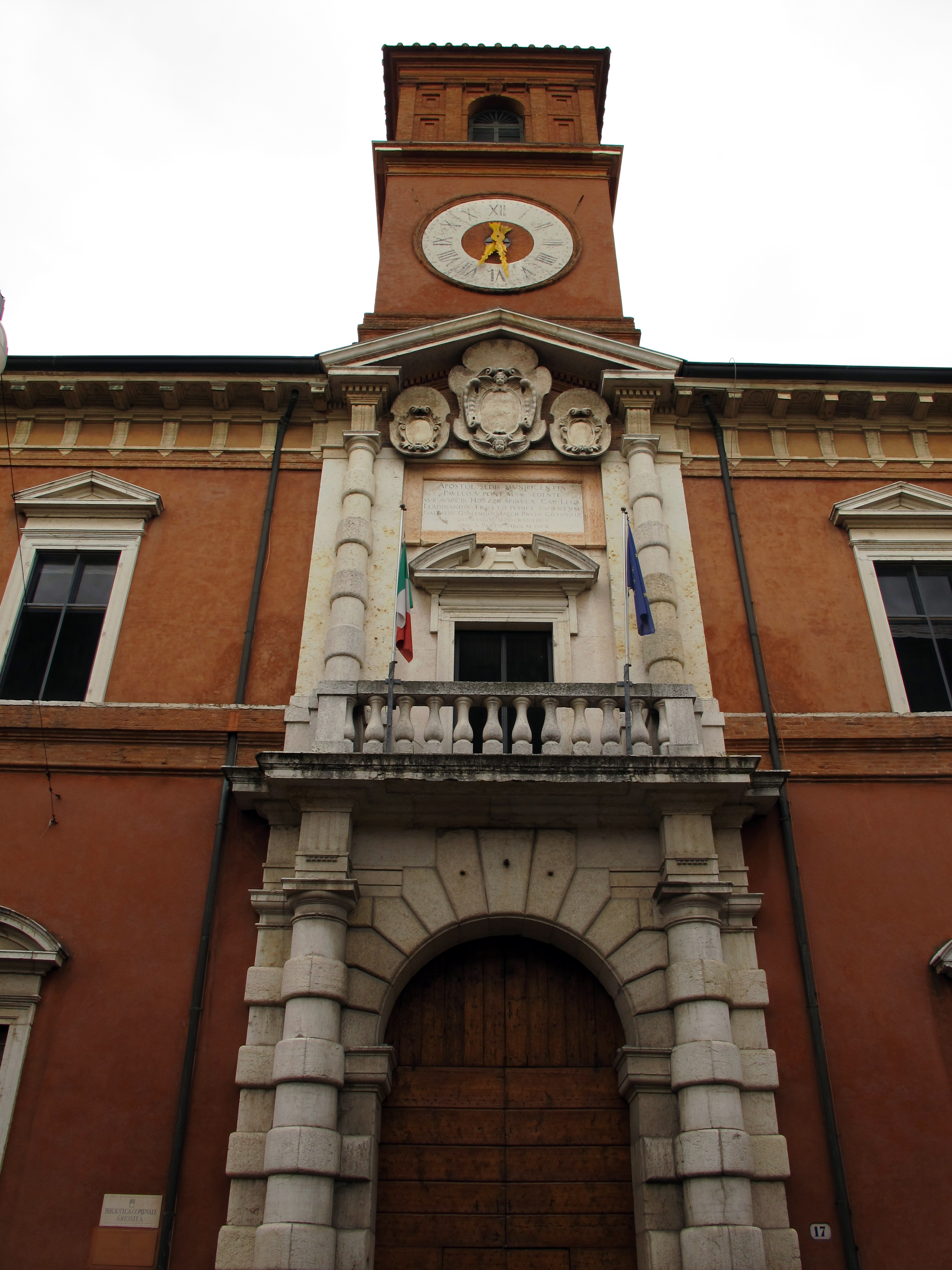 Palazzo Paradiso This is a photo of a monument which is part of cultural heritage of Italy.